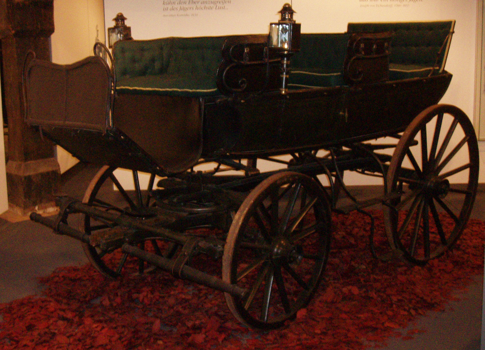 Char-à-Bancs, um 1810/20, Museum für Kutschen, Chaisen, Karren; Heidenheim an der Brenz, Baden-Württemberg, Deutschland.